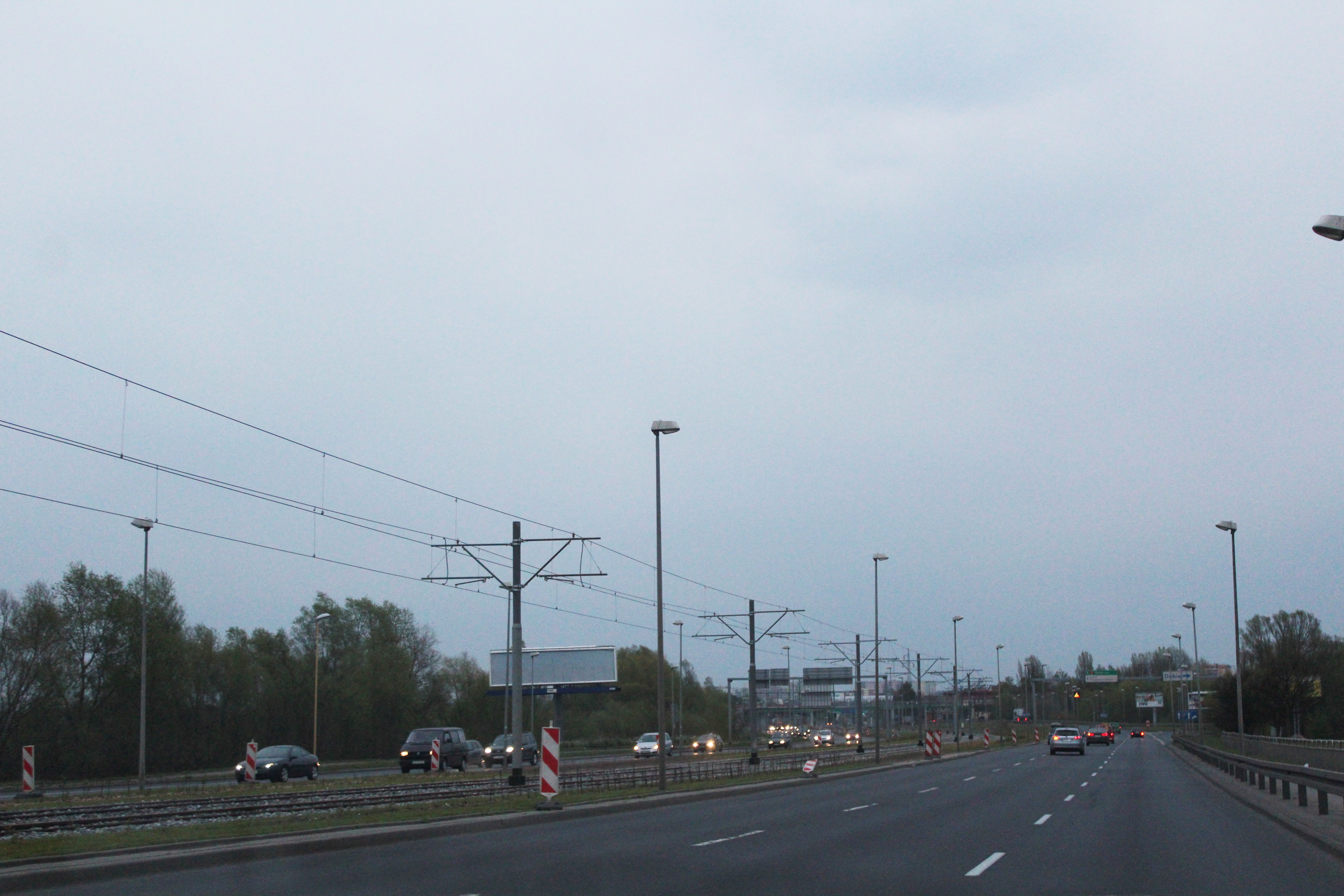 Linia SST w pobliżu osiedla Zdroje, Szczecin